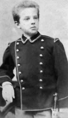 Vittorio Emanuele III di Savoia (1869-1947) da giovane con l'uniforme della Nunziatella